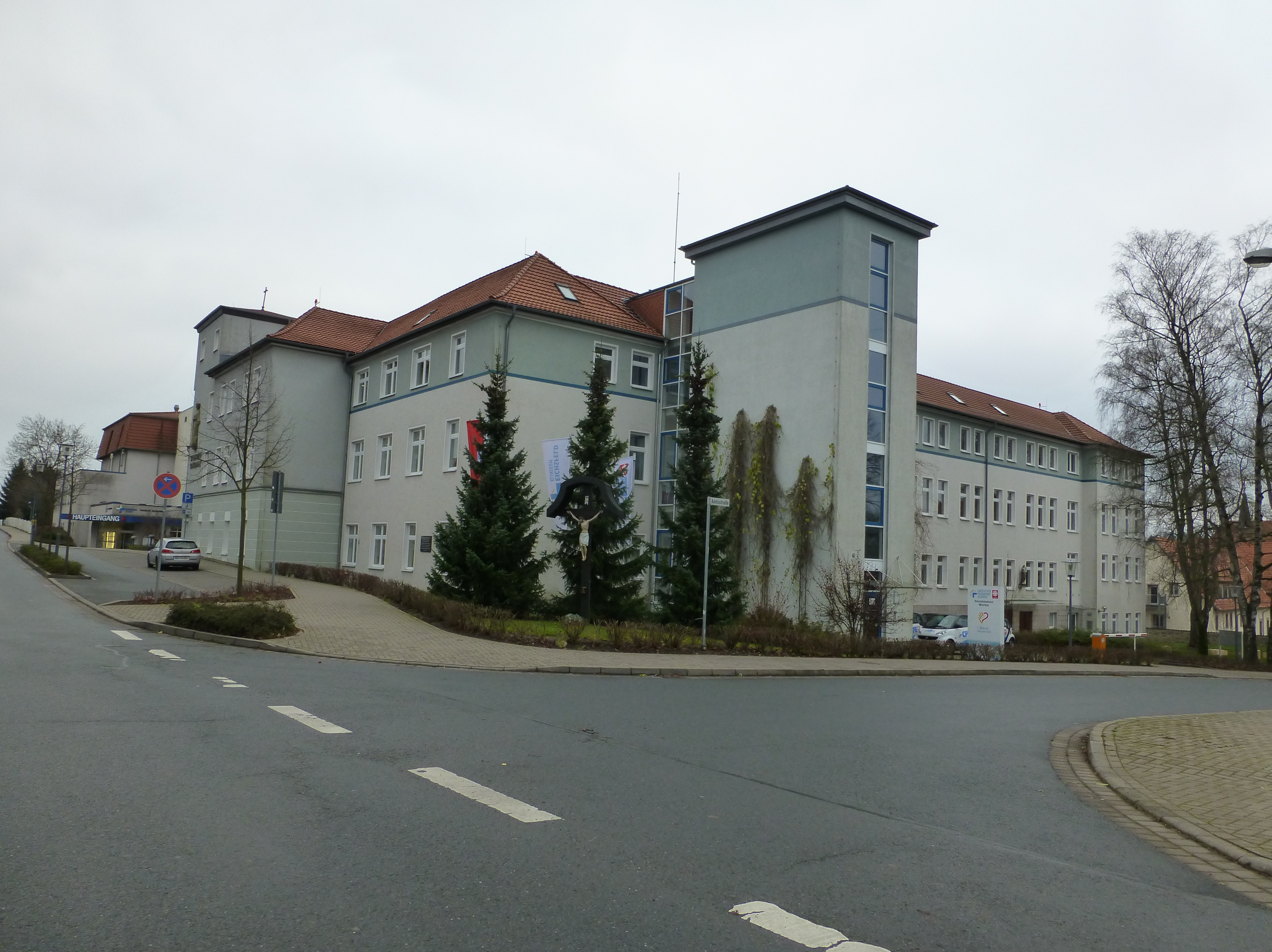 St. Elisabeth-Krankenhaus in Worbis (jetzt Eichsfeld-Klinikum)